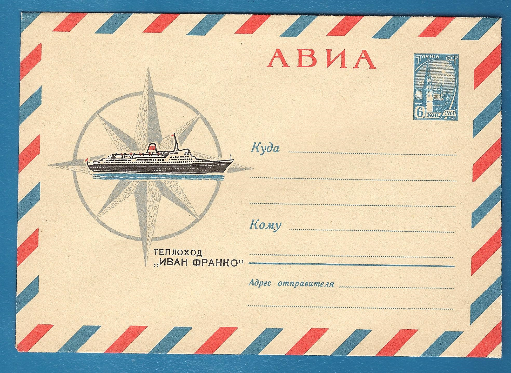 Борисов Анатолий Викторович (1933—1969). Маркированный конверт «Теплоход "Иван Франко"». 1966 г. Собрание Михаила Тренихина